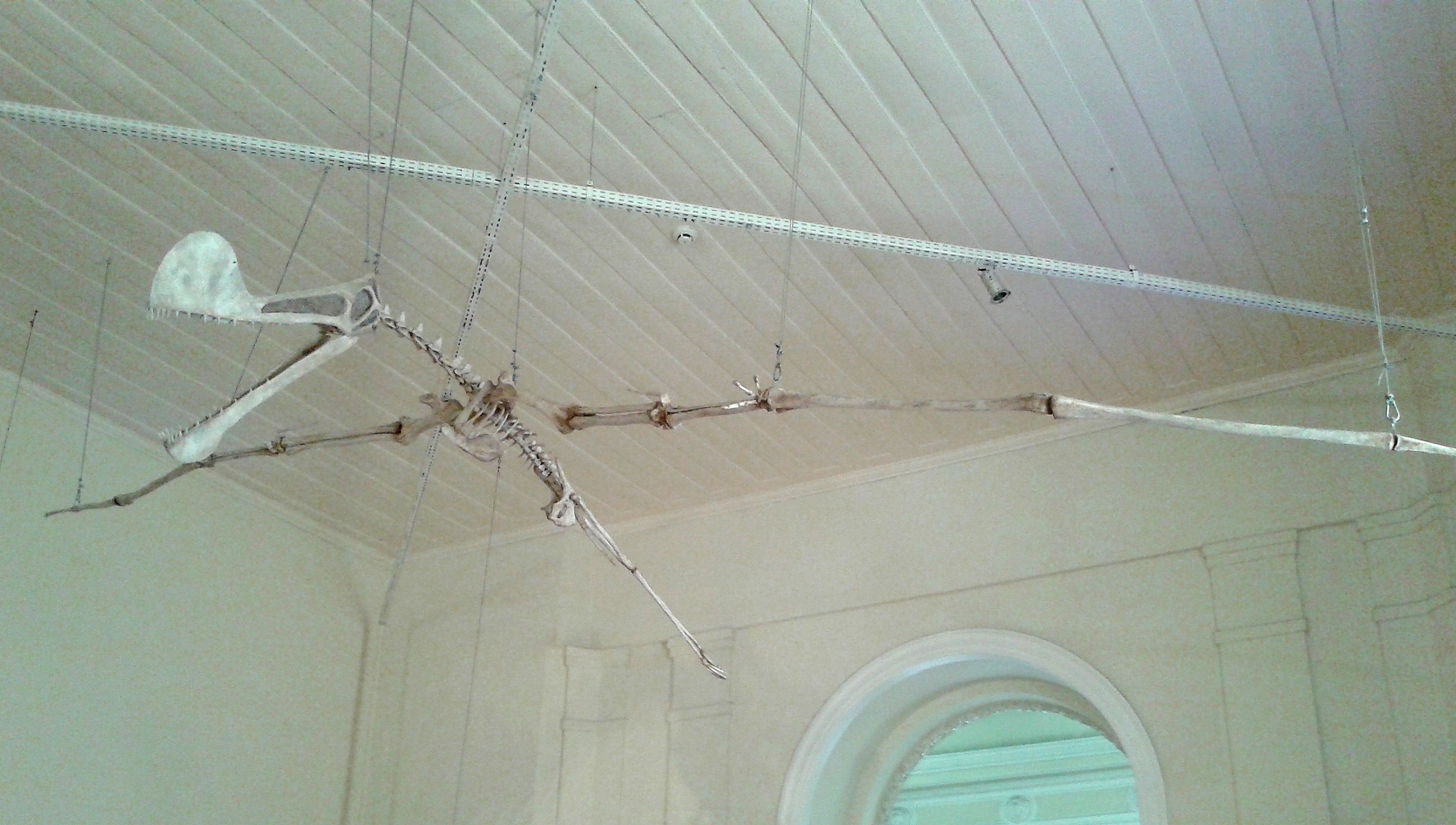 Classification: Pterosauria, Anhangueridae